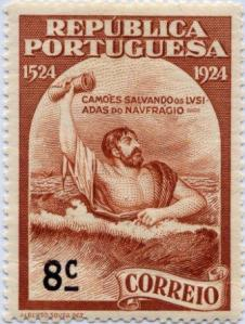 selo de Portugal mostrando Camões salvando Os Lusíadas